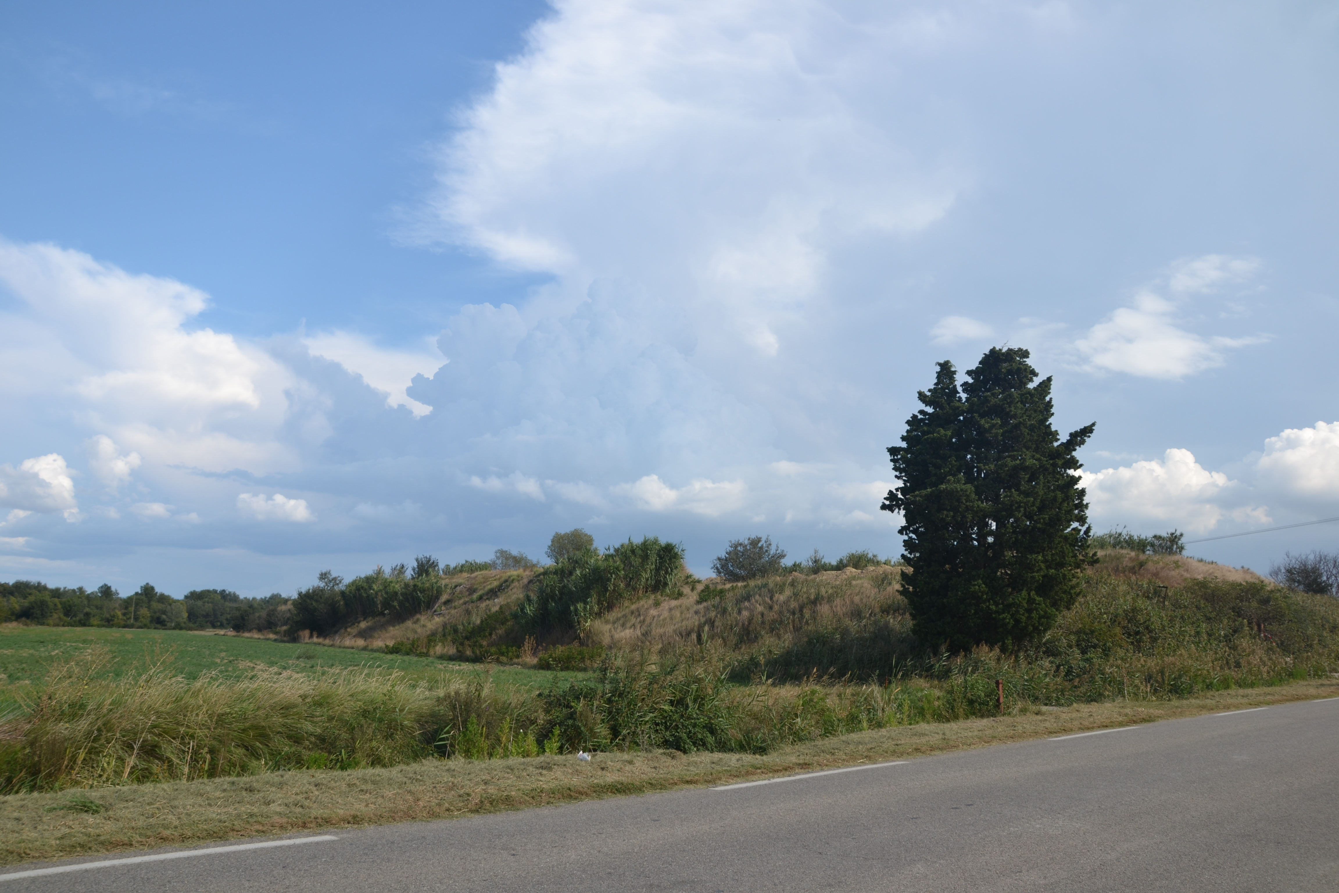 talus des boues et déchets récupérés de l'Ouvèze, à la suite des inondations de l'Ouvèze de Septembre 1992